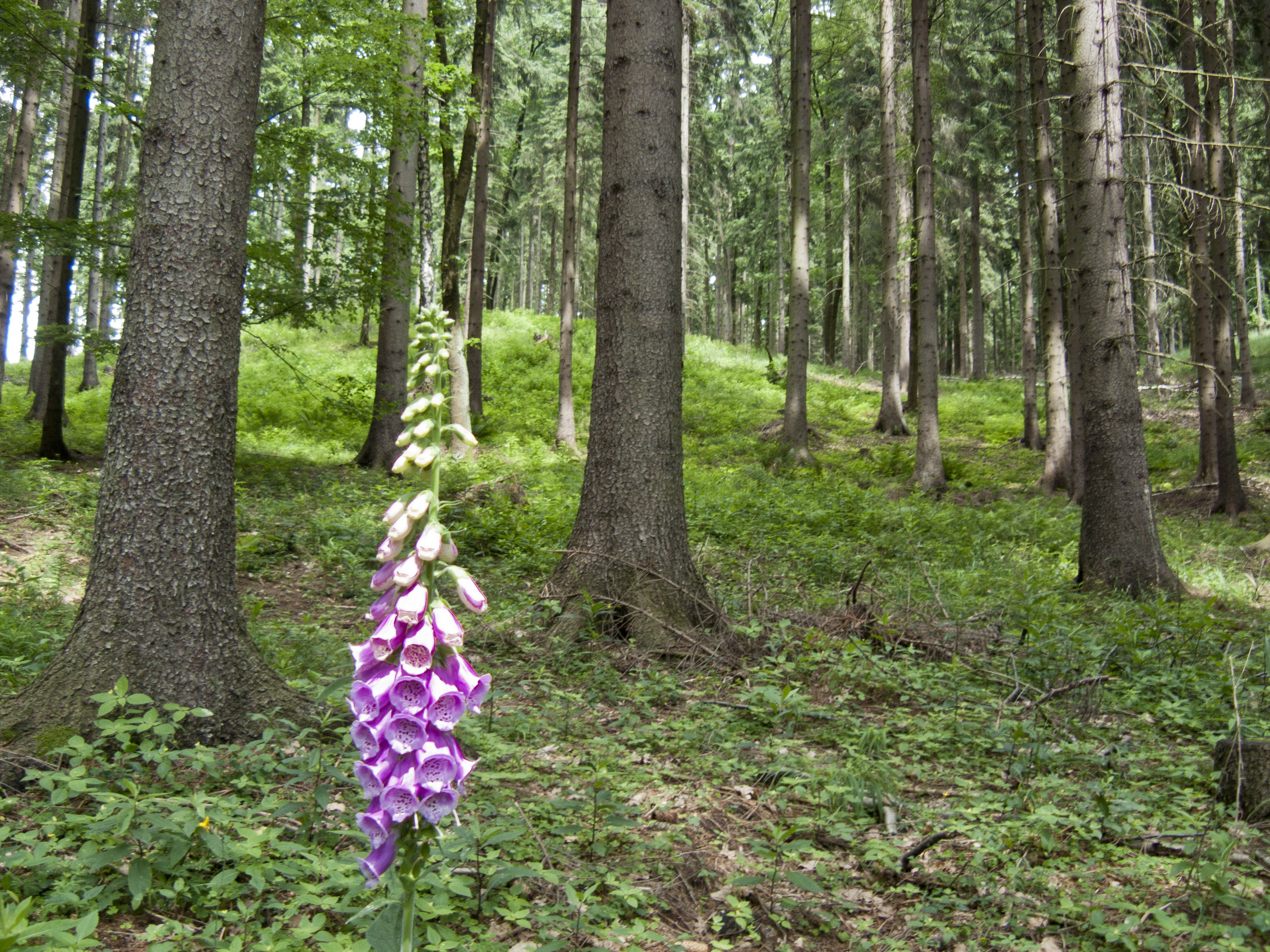 PP Cidlinský hřeben. Náprstník červený.